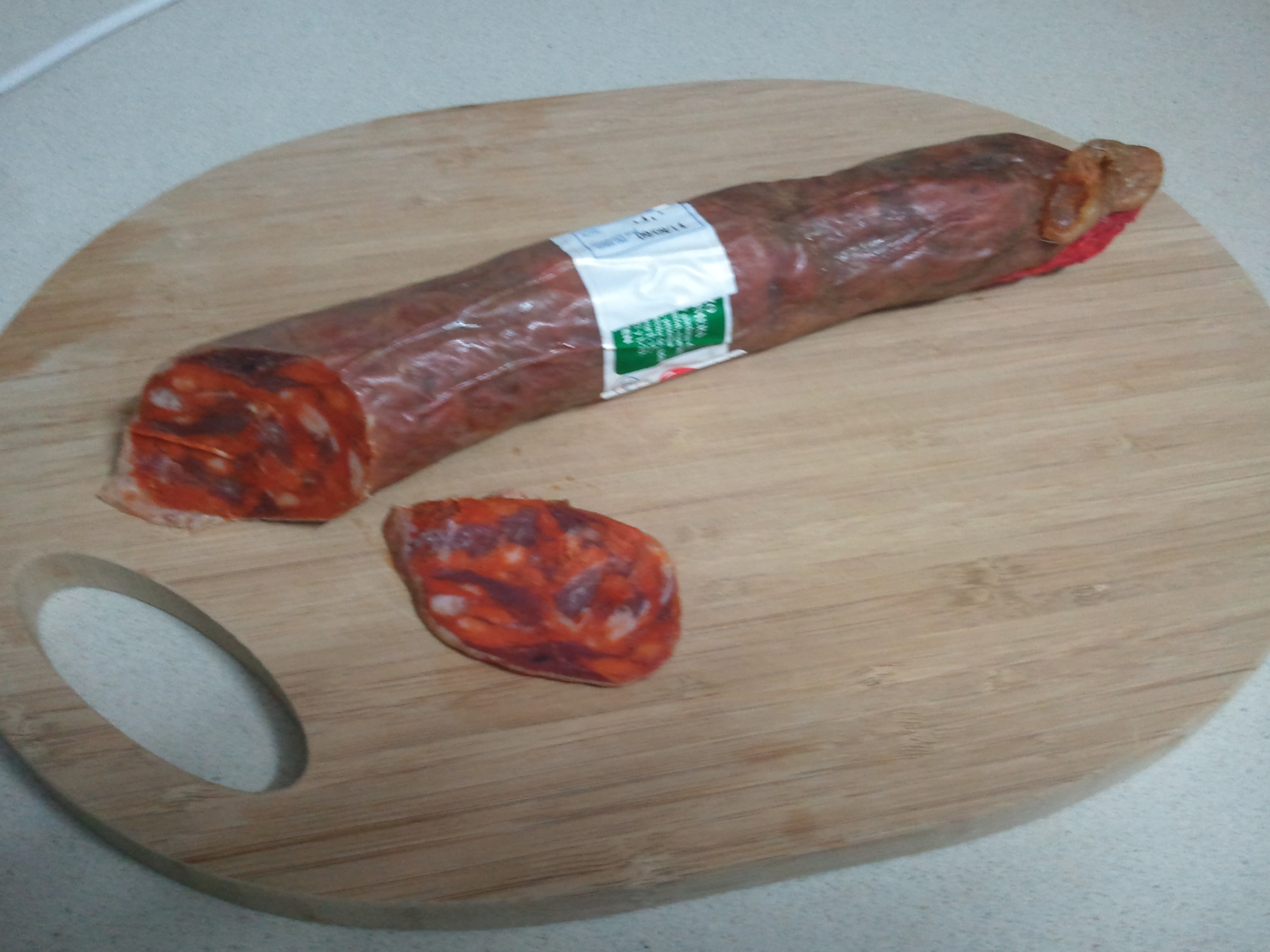 Chorizo cular, Roal, La Torre, Ávila, España.